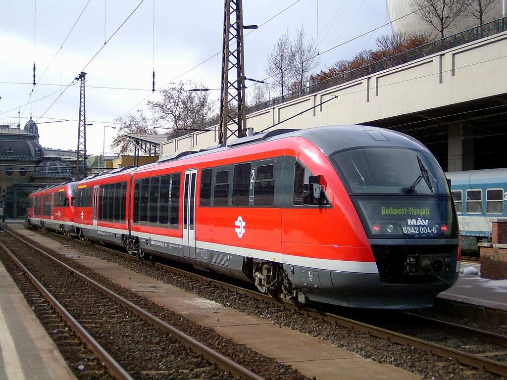 MÁV 6342-004, Budapest-Nyugati pu.